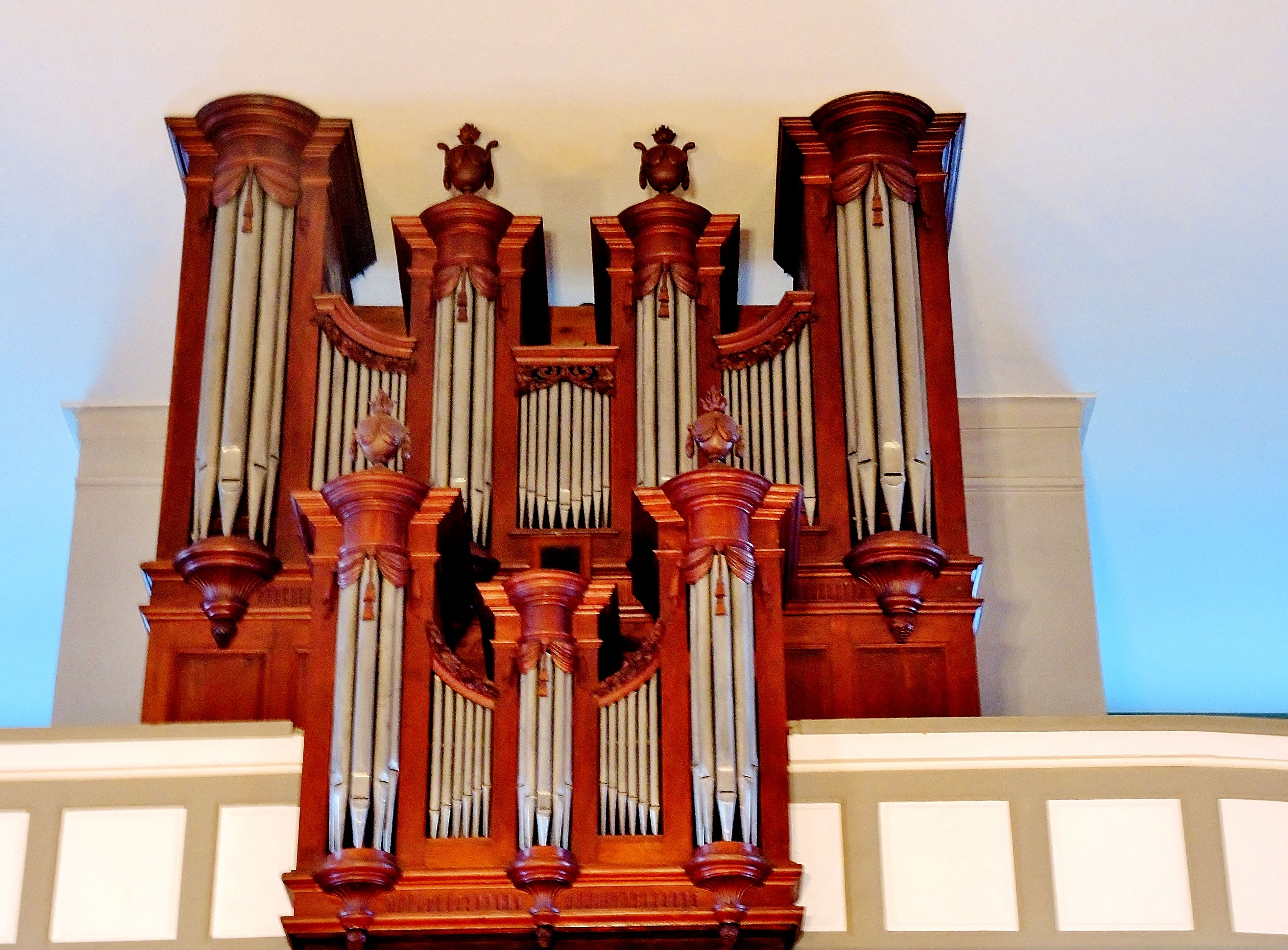 Orgue de Joseph Callinet, daté de 1833.